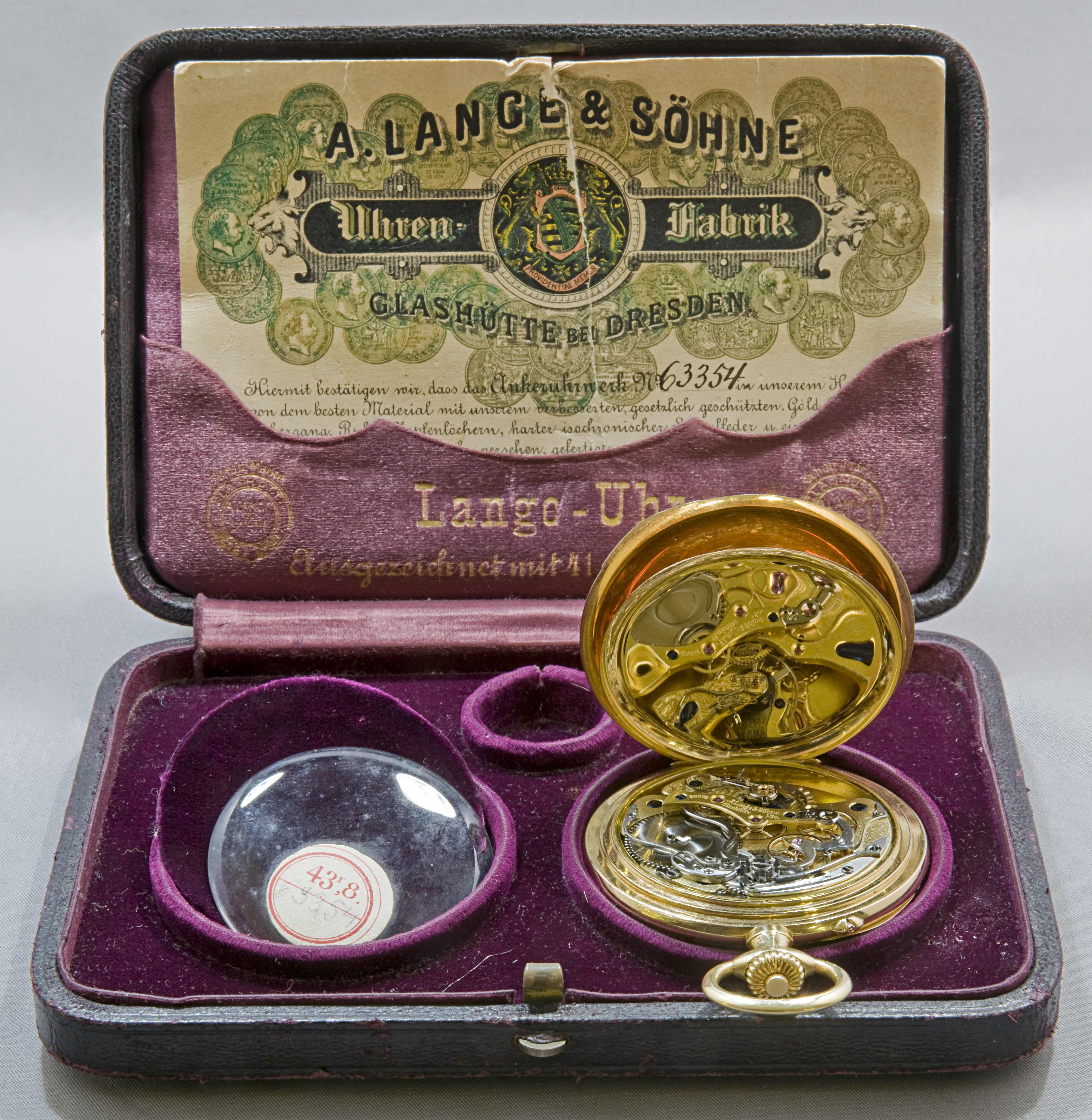 A. Lange & Söhne Ankeruhrwerk 43r8., No. 63354